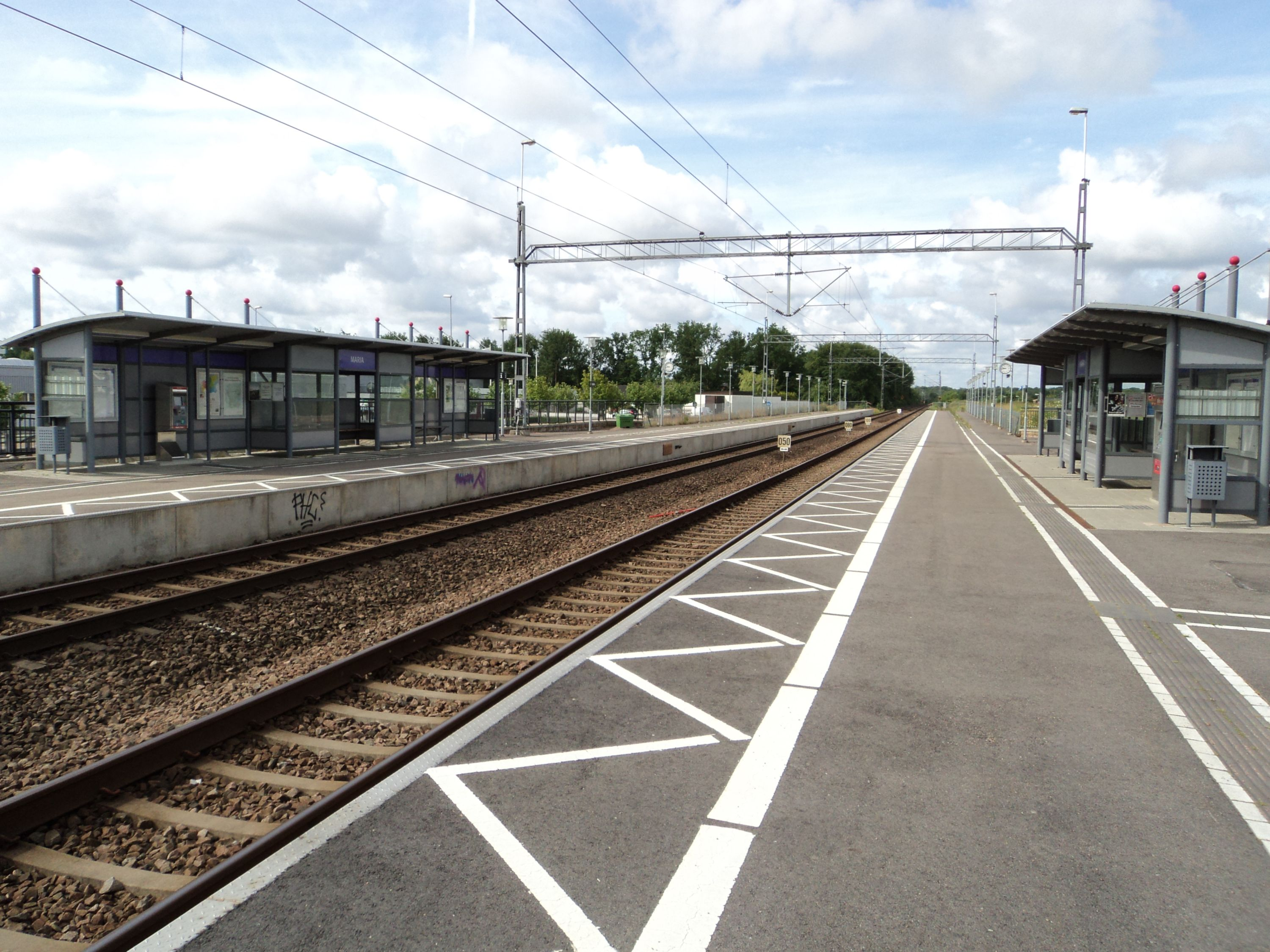 Maria station på Västkustbanan. Stationen kommer att byggas om till en fyrspårig station i samband med att dubbelspåret mellan Ängelholm-Maria stn byggs.